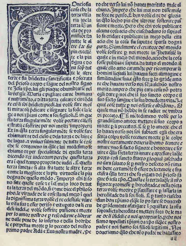 Voyage d'outre mer